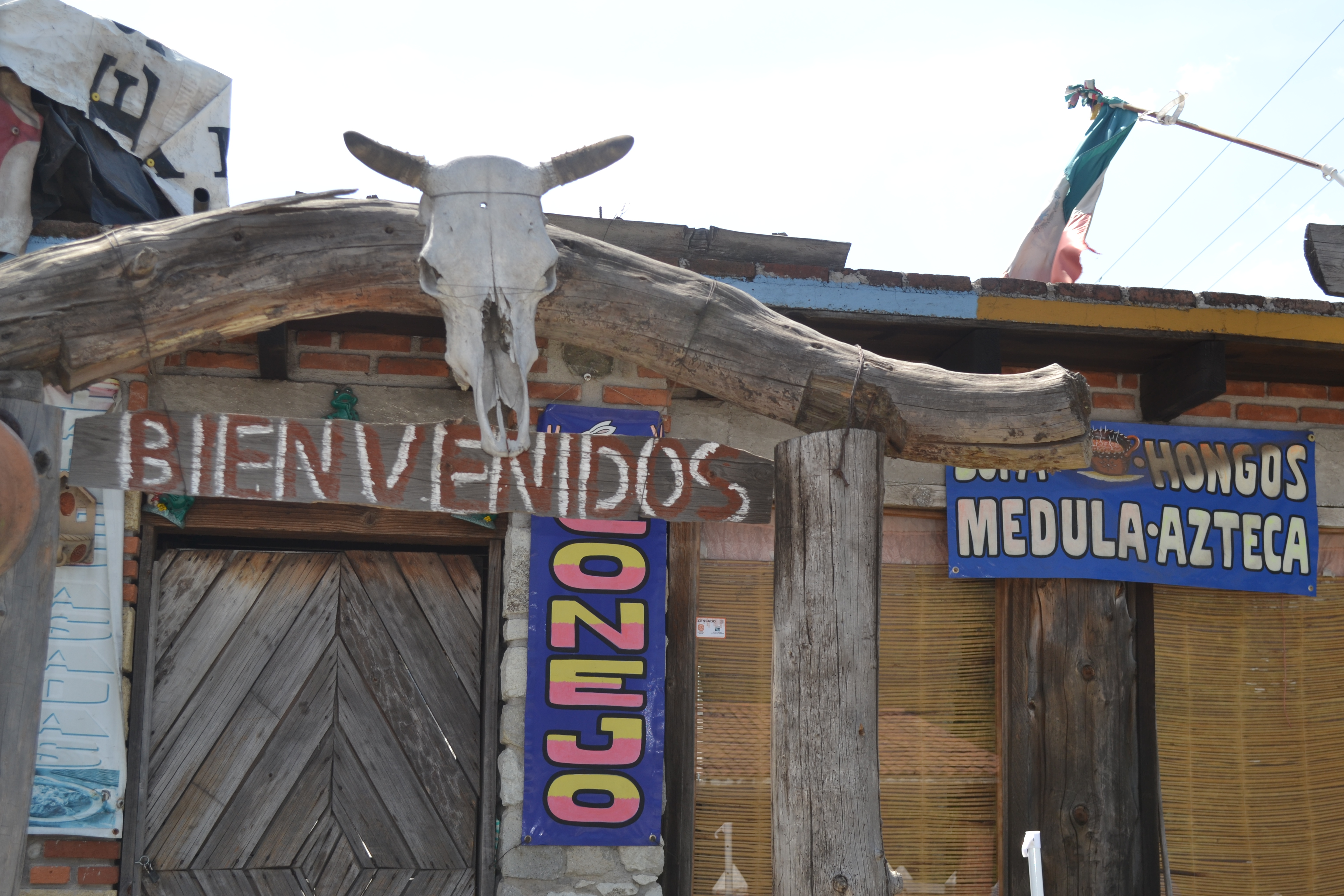 "Bienvenidos" entrada a restaurante